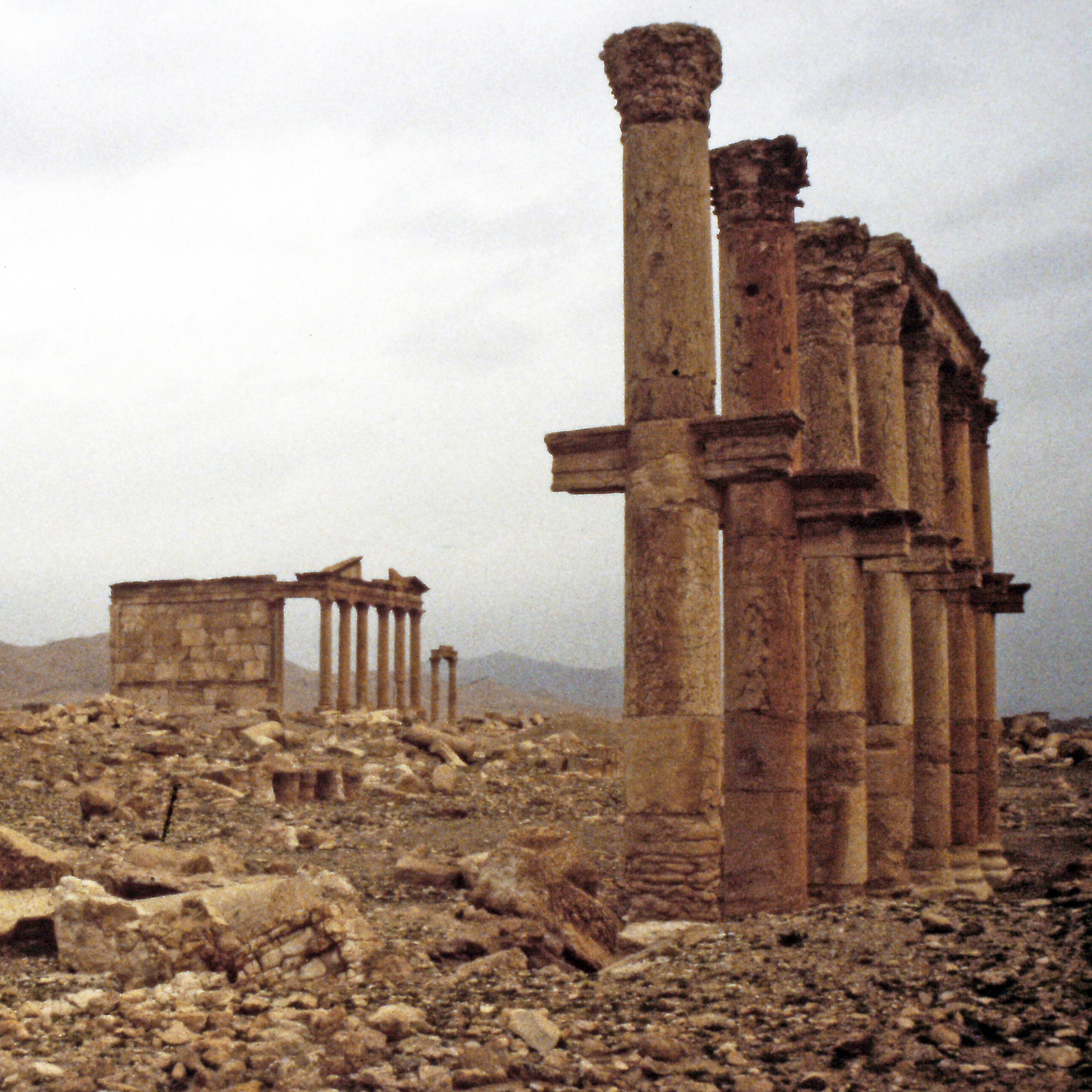 Via colonnata verso la Porta di Damasco e Tempio funerario